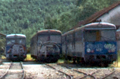 Melhoria de File:Portuguese 9400 Series Railcars.png